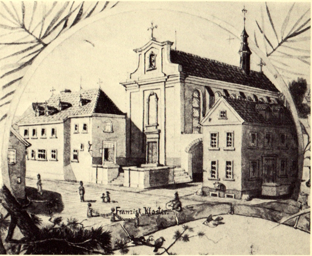 Werl, altes Kapuzinerkloster 1880, Zeichnung von Adolf Stampfer